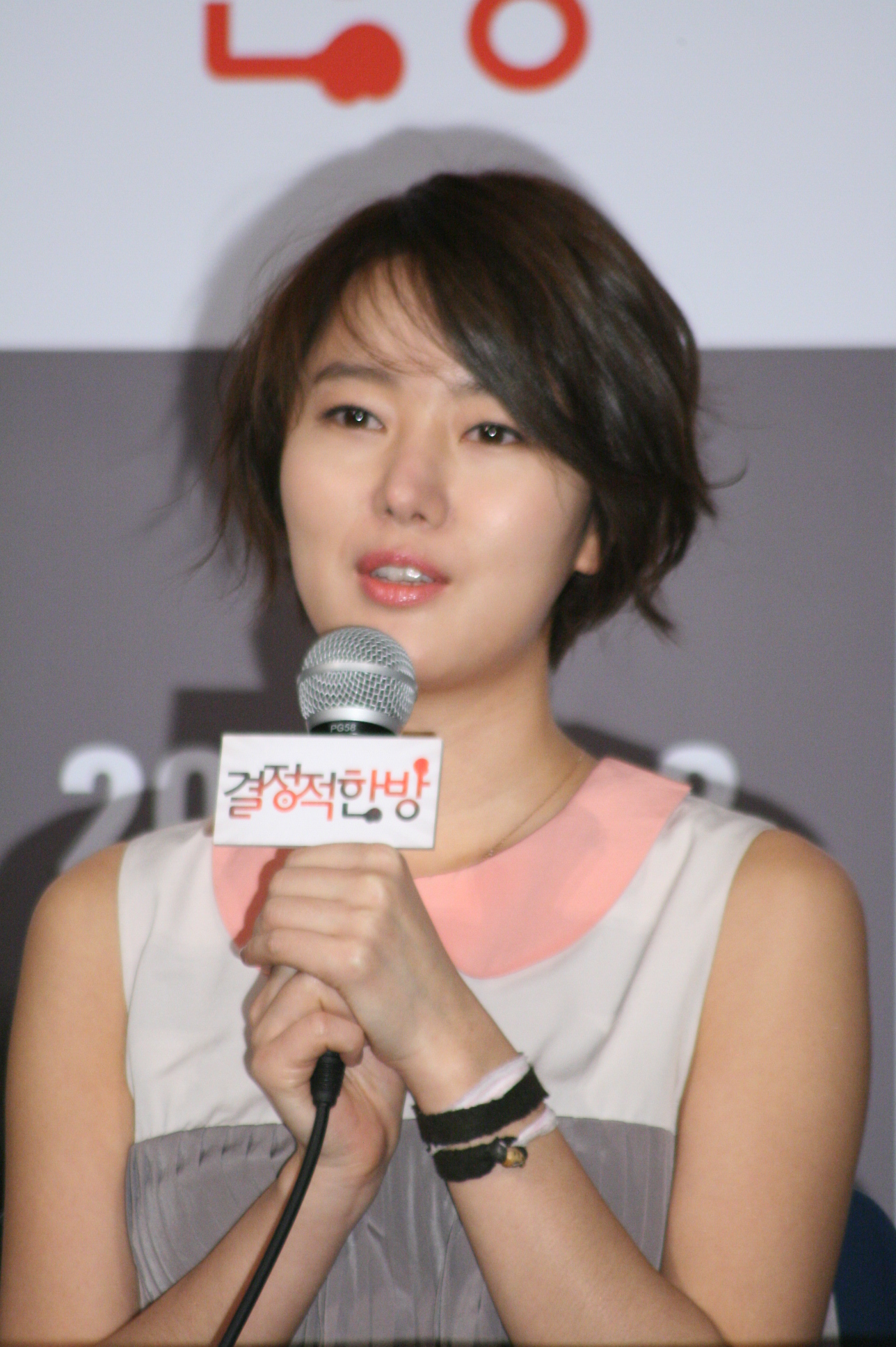 2011년 12월 1일 서울 왕십리 CGV에서 열린 영화 《결정적 한방》 언론시사회 및 기자간담회에 참석한 윤진서.